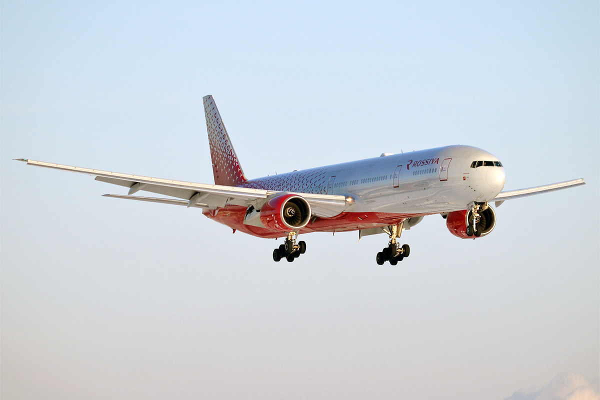 Rossiya, EI-UNN, Boeing 777-312